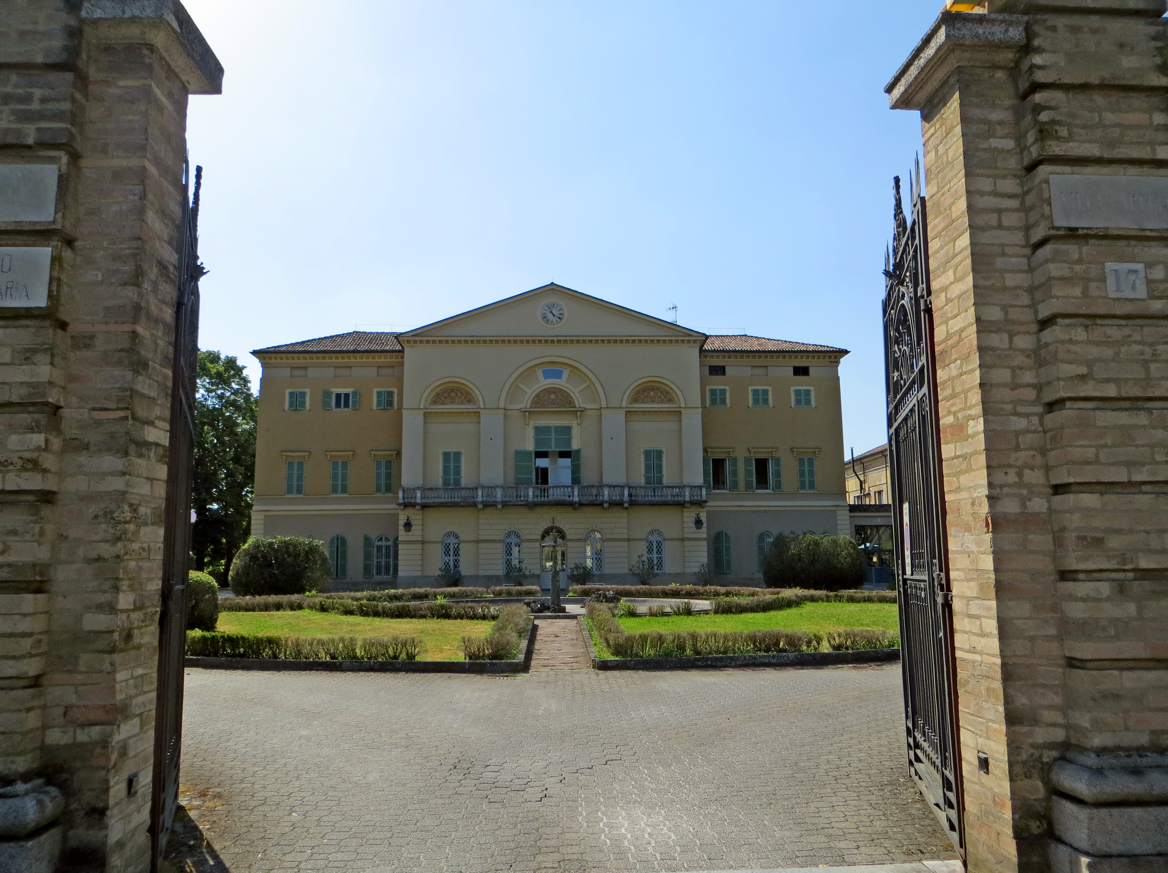 Villa Avogadro (Parma) - facciata